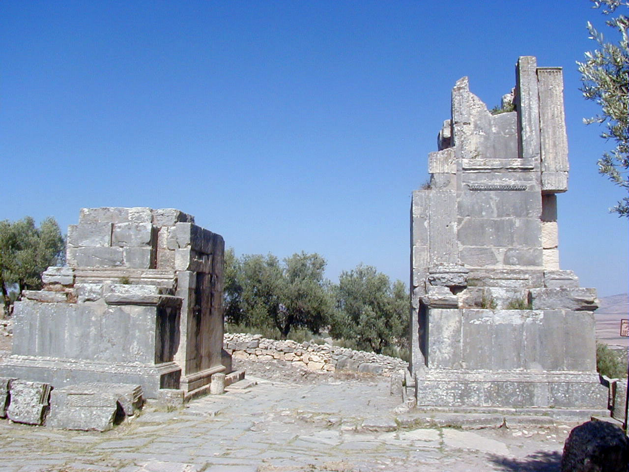 Arc de Septime Sévère à Dougga (Tunisie)